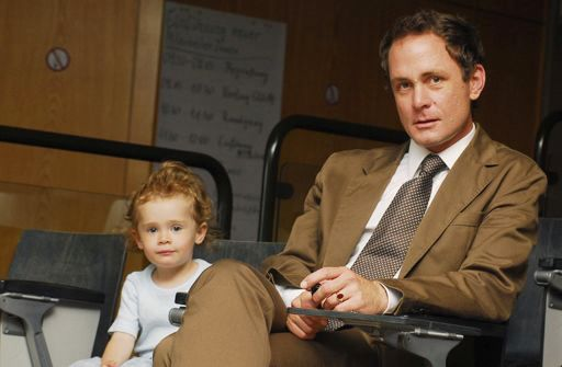 Vater mit Tochter